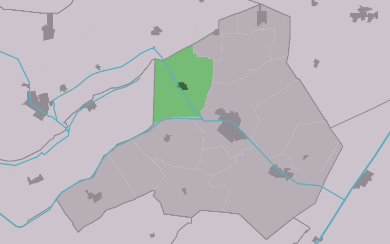 Kaartsje fan himrik fan Donkerbroek